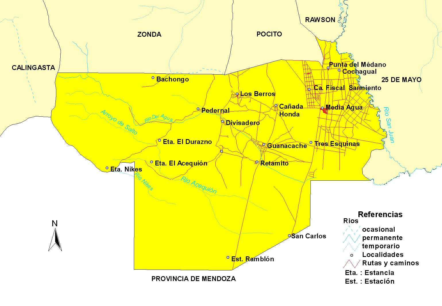 Mapa del departamento Sarmiento, provincia de San Juan, Argentina